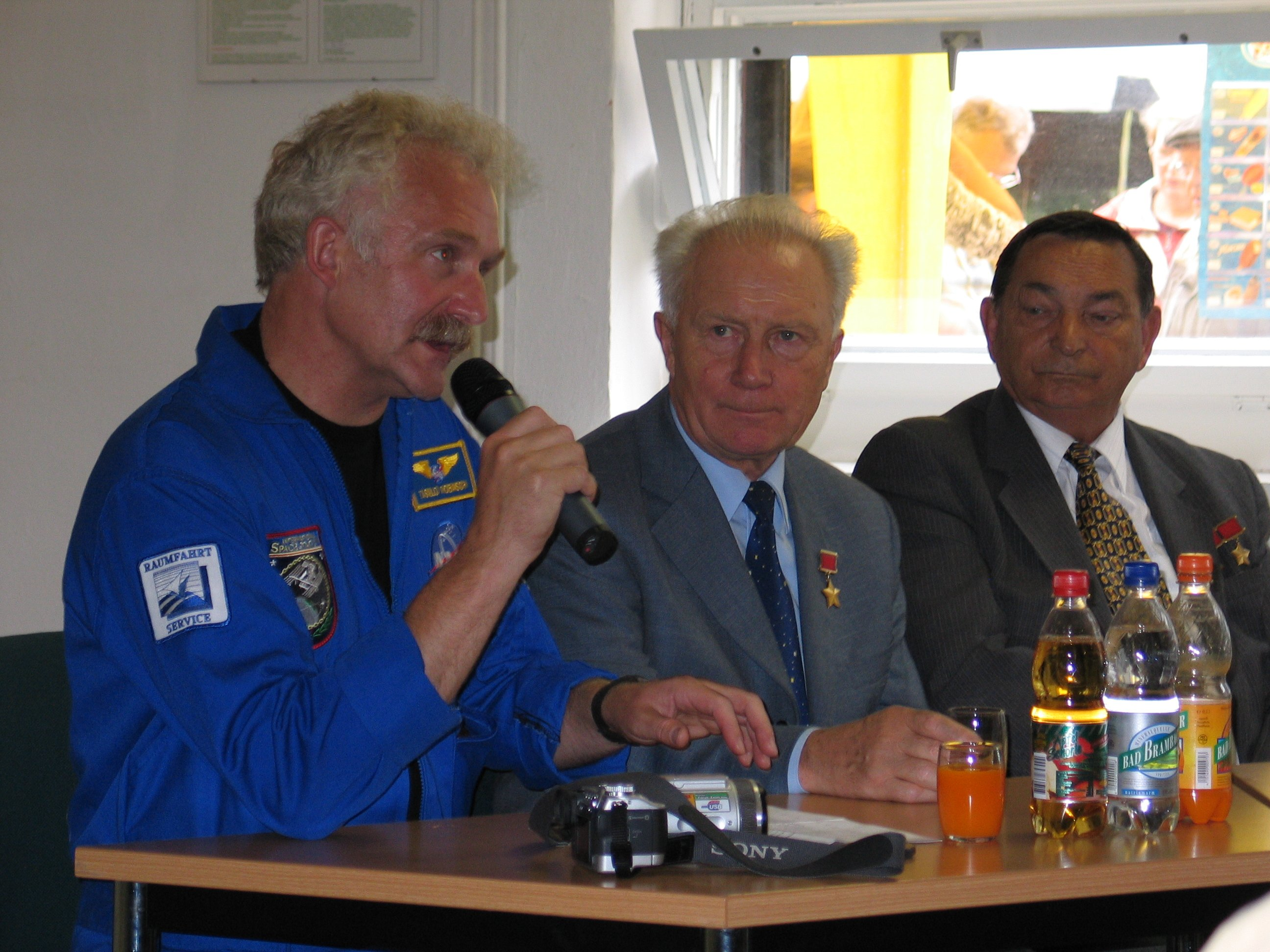 Die Besatzung des Raumschiffs "Sojus 31" mit dem ersten Deutschen im All, Sigmund Jähn und seinem Kommandanten Valery Bykowski wird auf einem Forum von Tasillo Römisch interviewt.